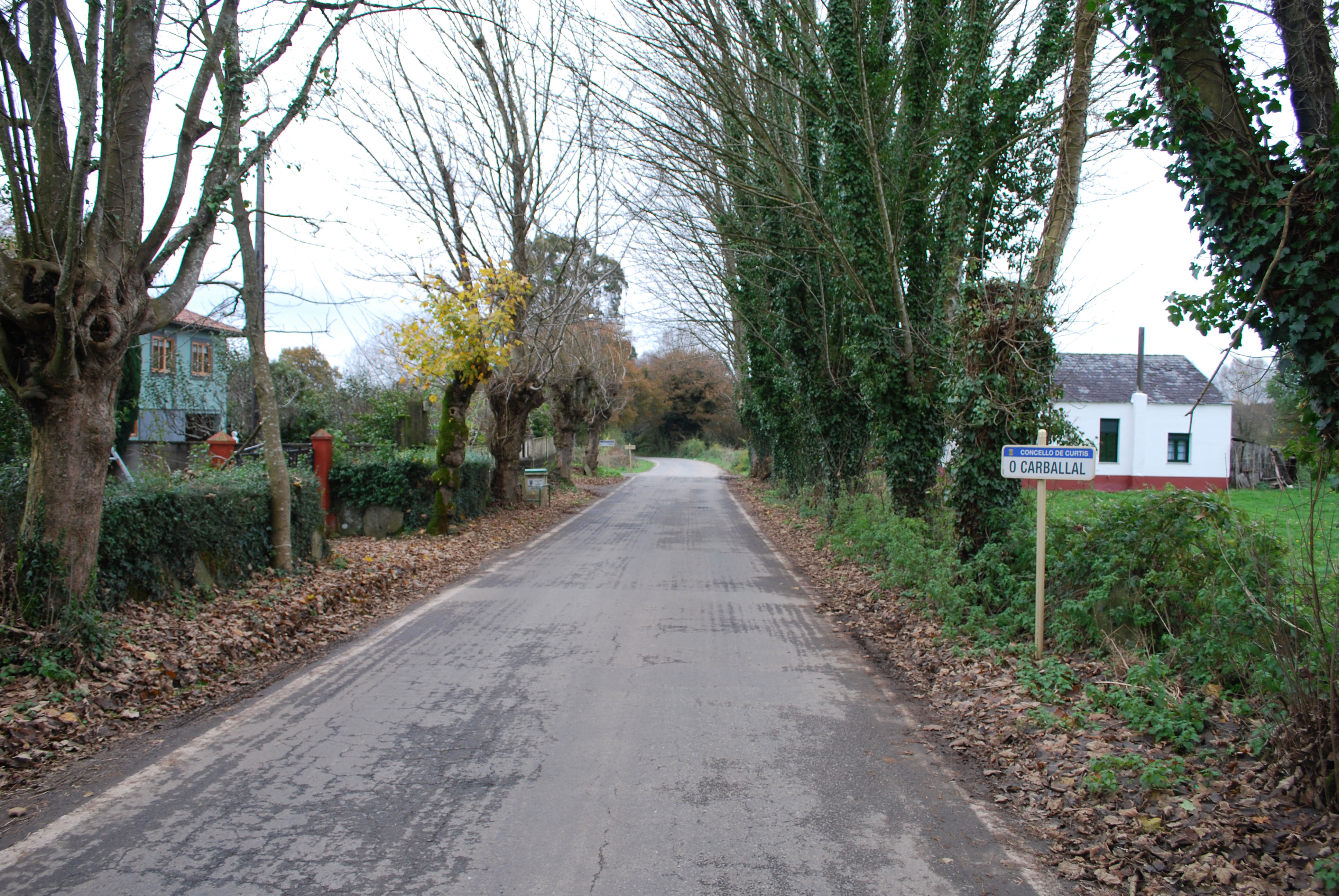 Vista estrada O Carballal Santaia Curtis A Coruña Galiza